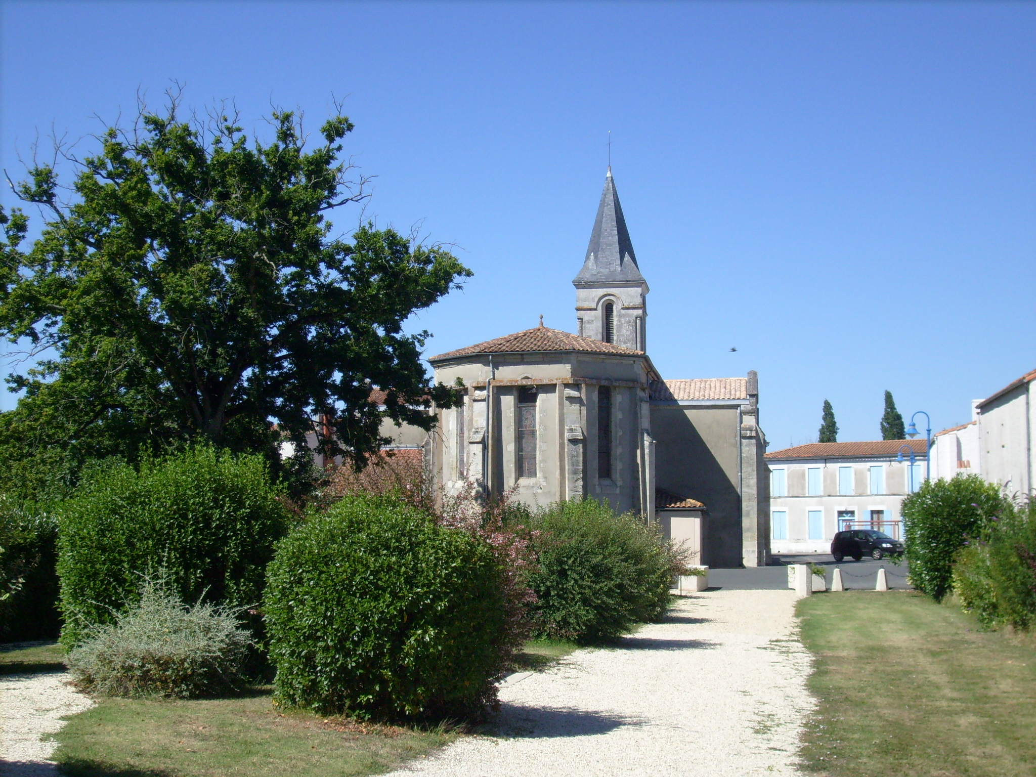 L'église d'Etaules vue depuis le square de Kembs